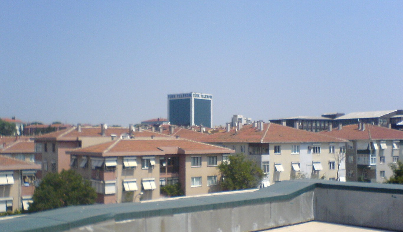 Lisans